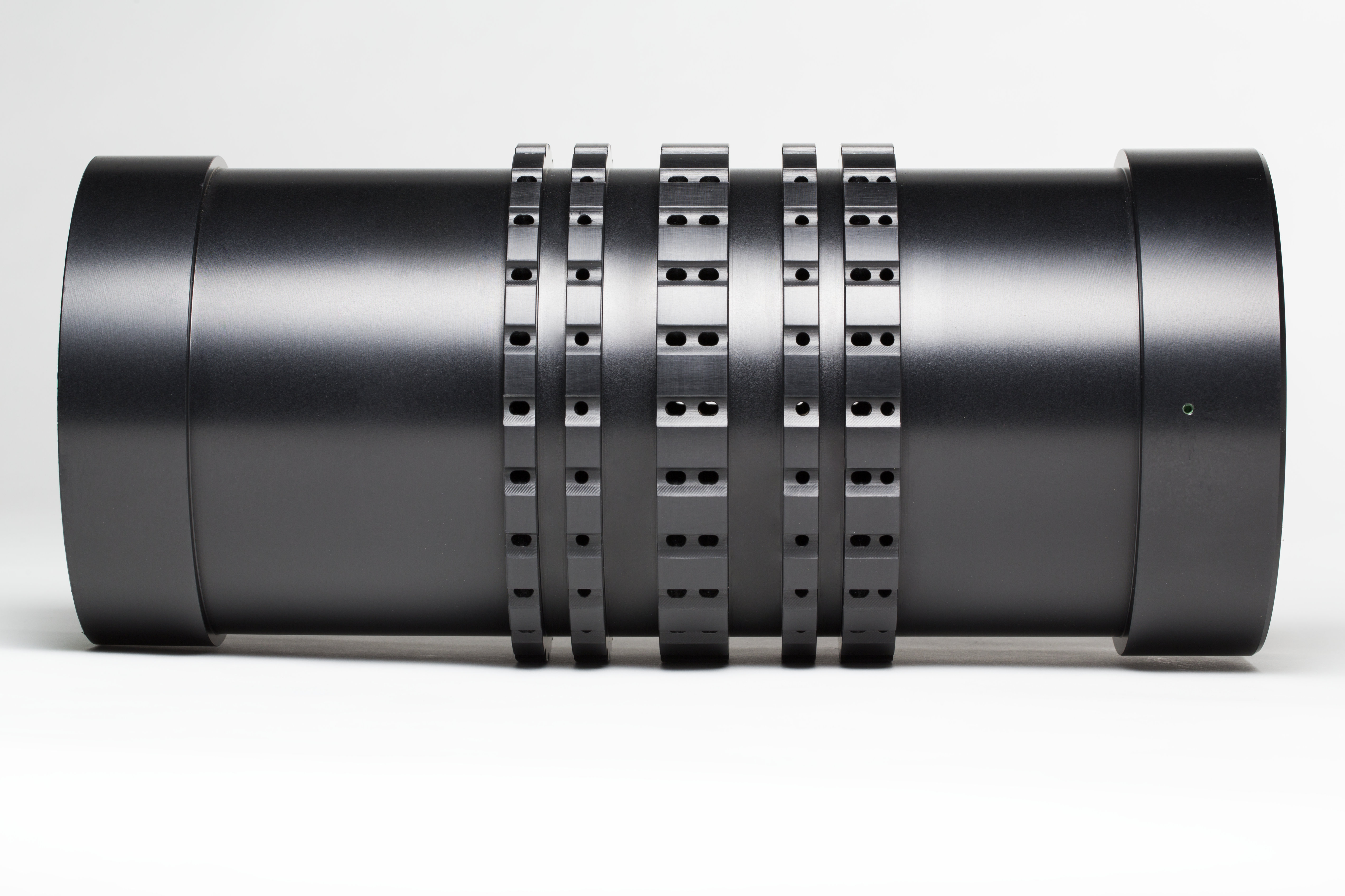 Tvrdý černý elox Molins Plzeň